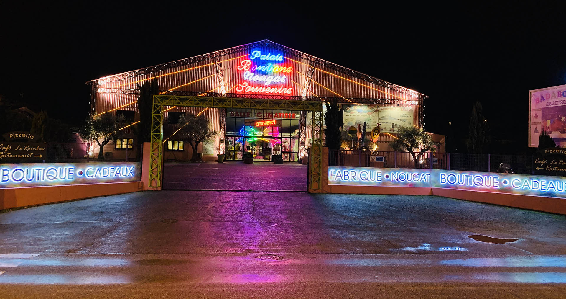 Entrée du site sur la RN7